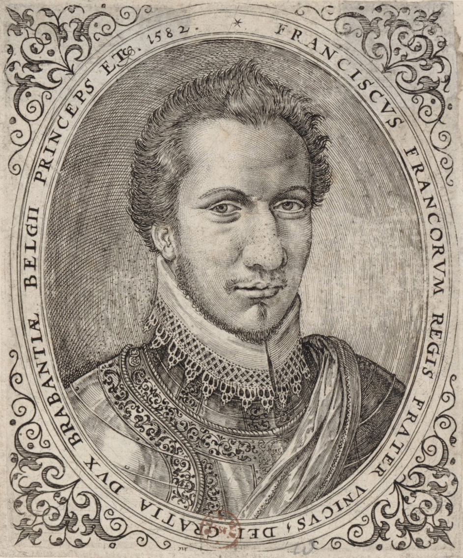 François, duc d'Anjou et d'Alençon.